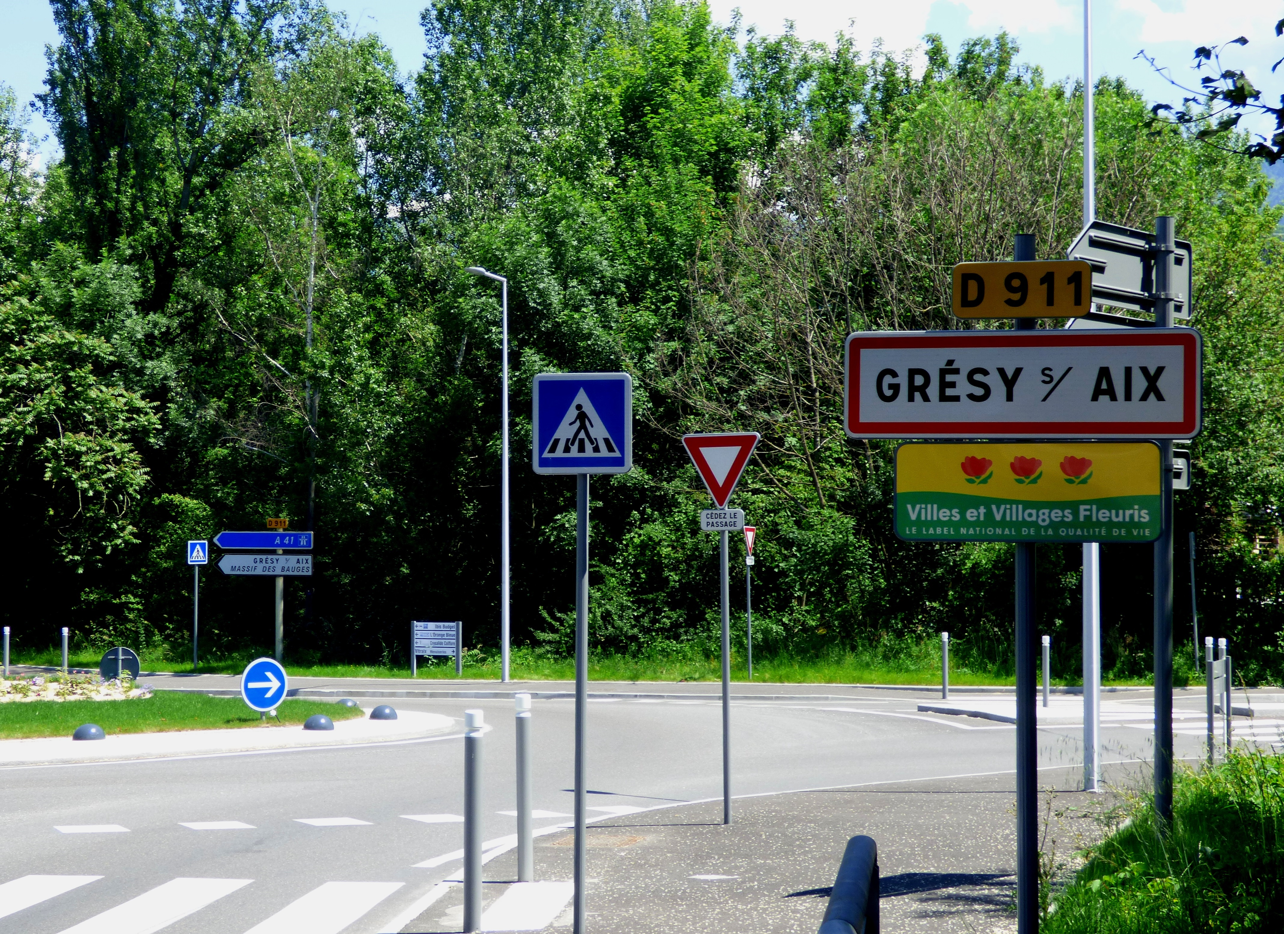 Panneau d'entrée sur la commune de Grésy-sur-Aix par la route départementale 911, en provenance notamment d'Aix-les-Bains.